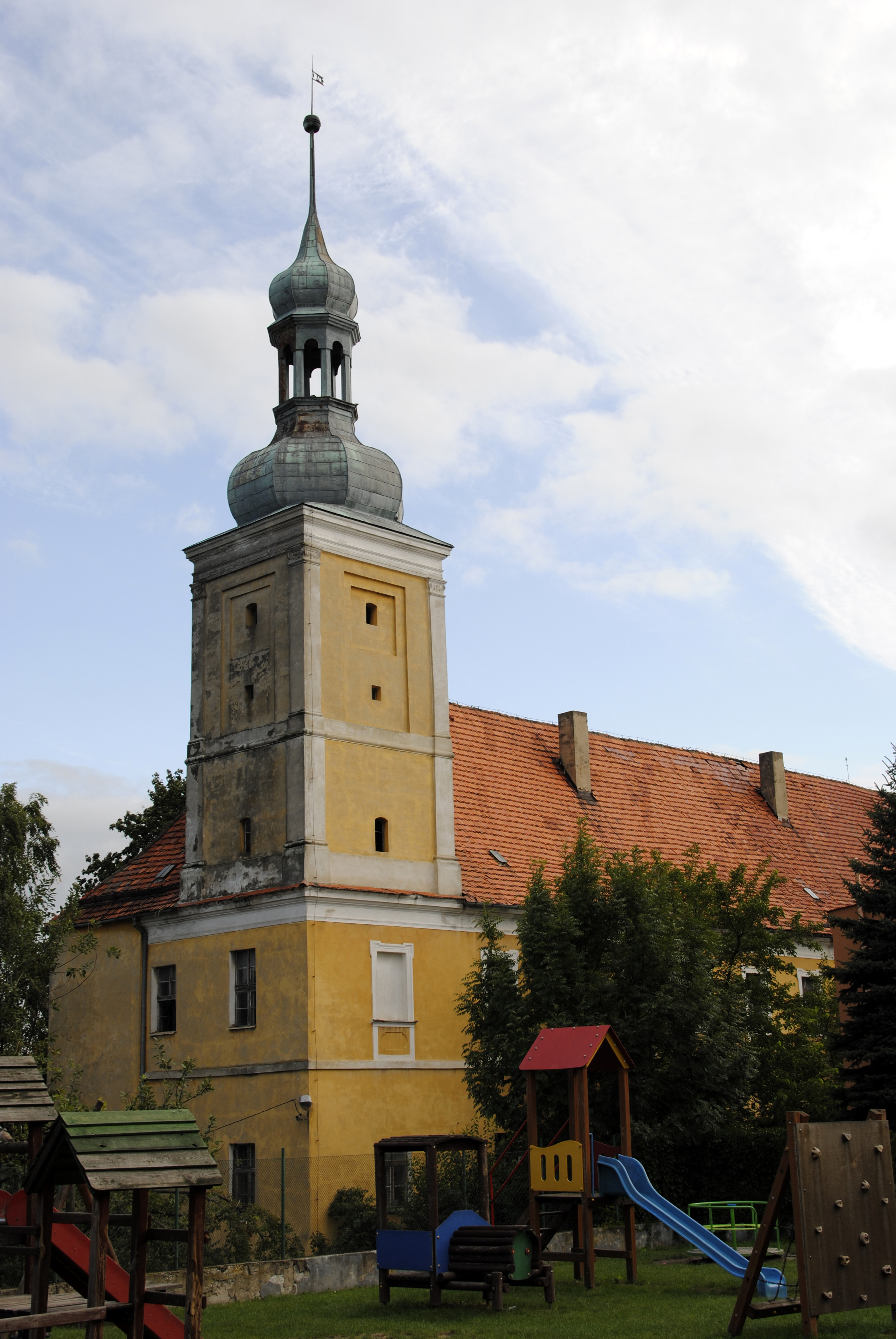 Schloss Zülz (Oberschlesien)